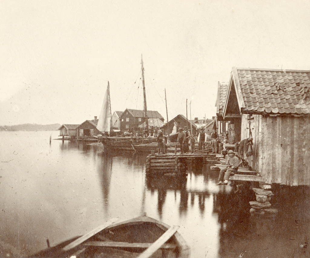 Båthus och bryggor vid fiskeläget på Klädesholmen